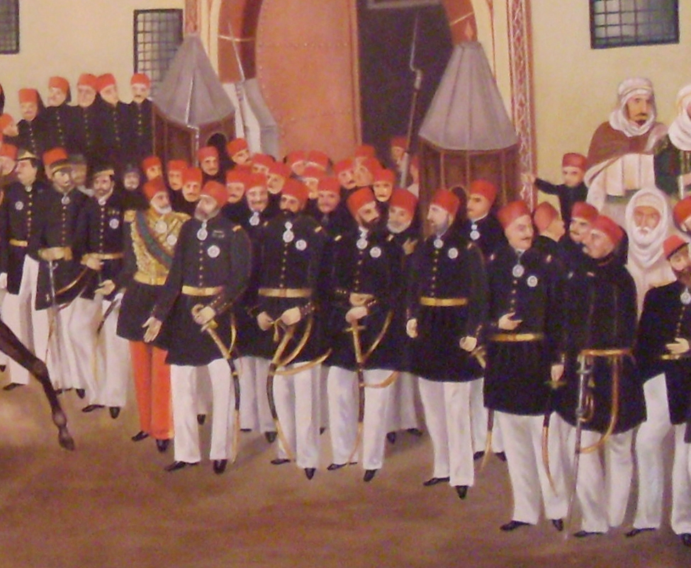 Défilé du contingent de retour de Crimée à Qsar al-Taj Détail d'un tableau illustrant le retour en août 1856 du contingent tunisien de la guerre de Crimée, accueilli devant le Dar al-Taj par Mohammed Bey et sa suite composée notamment de Sadok Bey, Giuseppe Raffo et Mustapha Khaznadar Huile sur toile, 195 x 129,5 cm Tunis, Institut national du patrimoine, collection Qsar es-Saïd, inv. 46-07-28-04